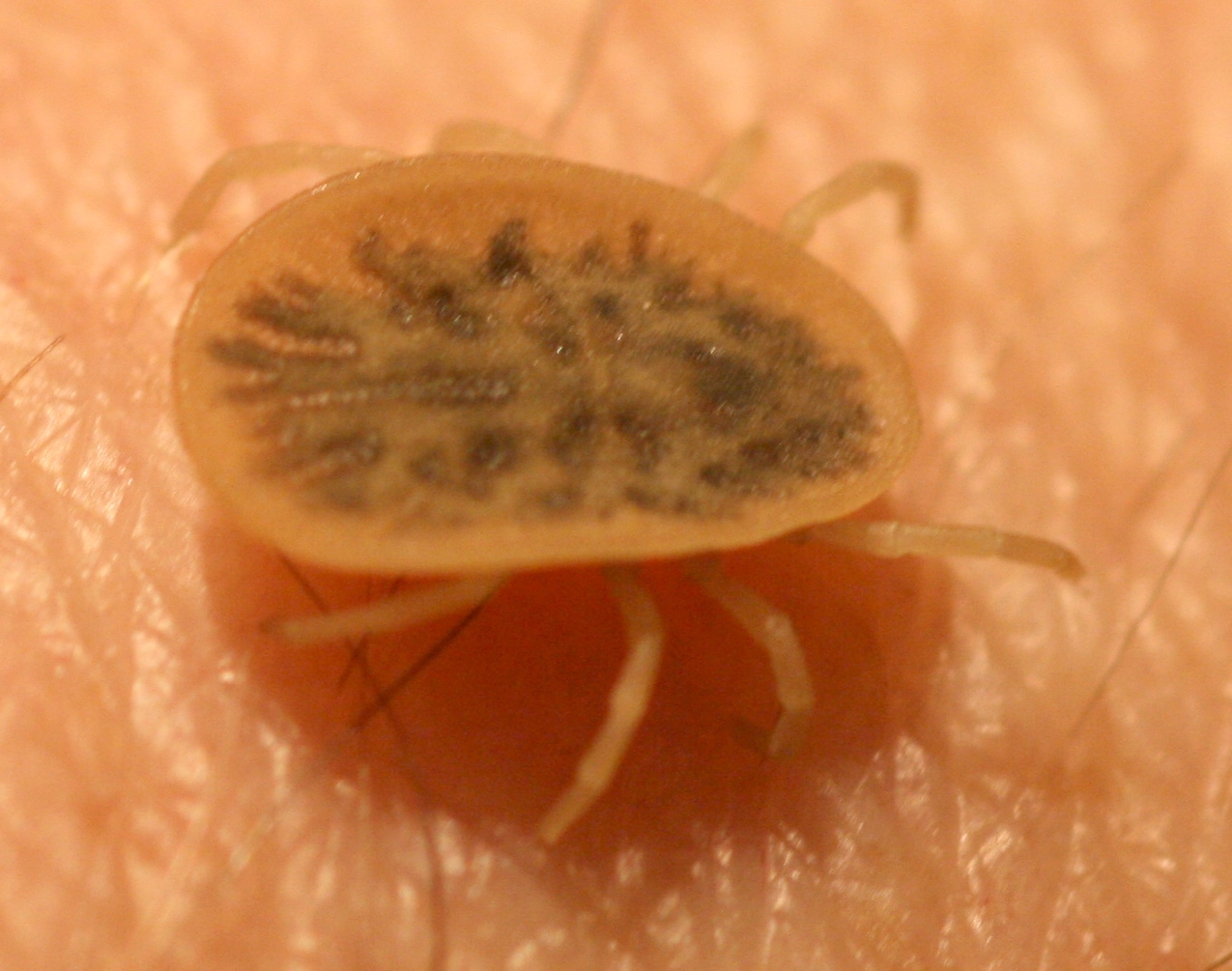 female Argas reflexus